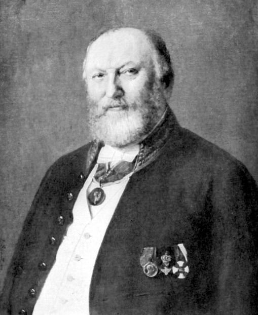 Friedrich Schlie (1839-1902), deutscher Archäologe und Kunsthistoriker. Bildnis von L(o)uise Schmidt aus dem Jahr 1898